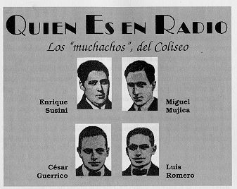 Radio Argentina Pioneers